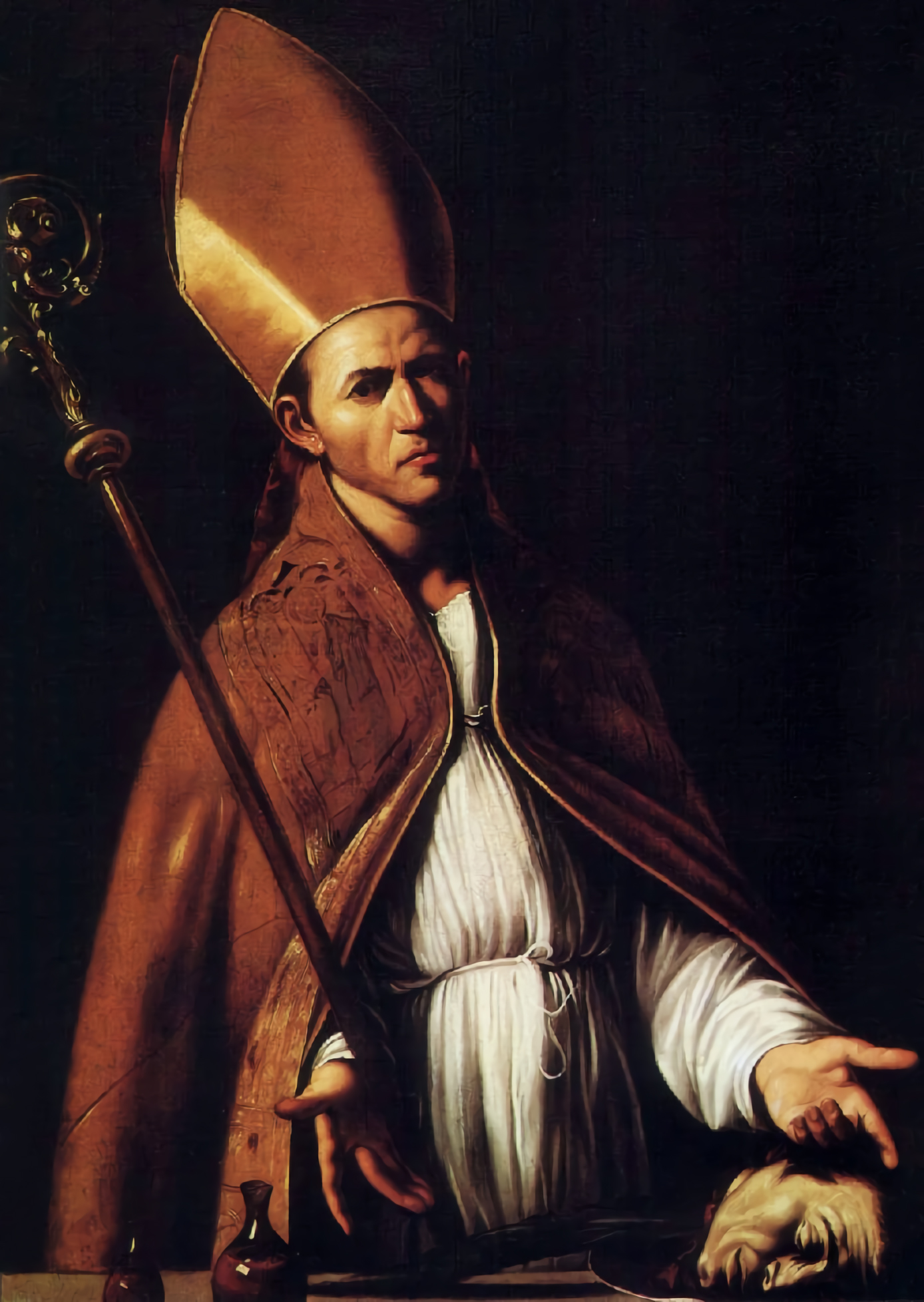 According Maurizio Marini (Caravaggio «pictor praestantissimus», 2014) is a copy of a lost work of Michelangelo Merisi da Caravaggio